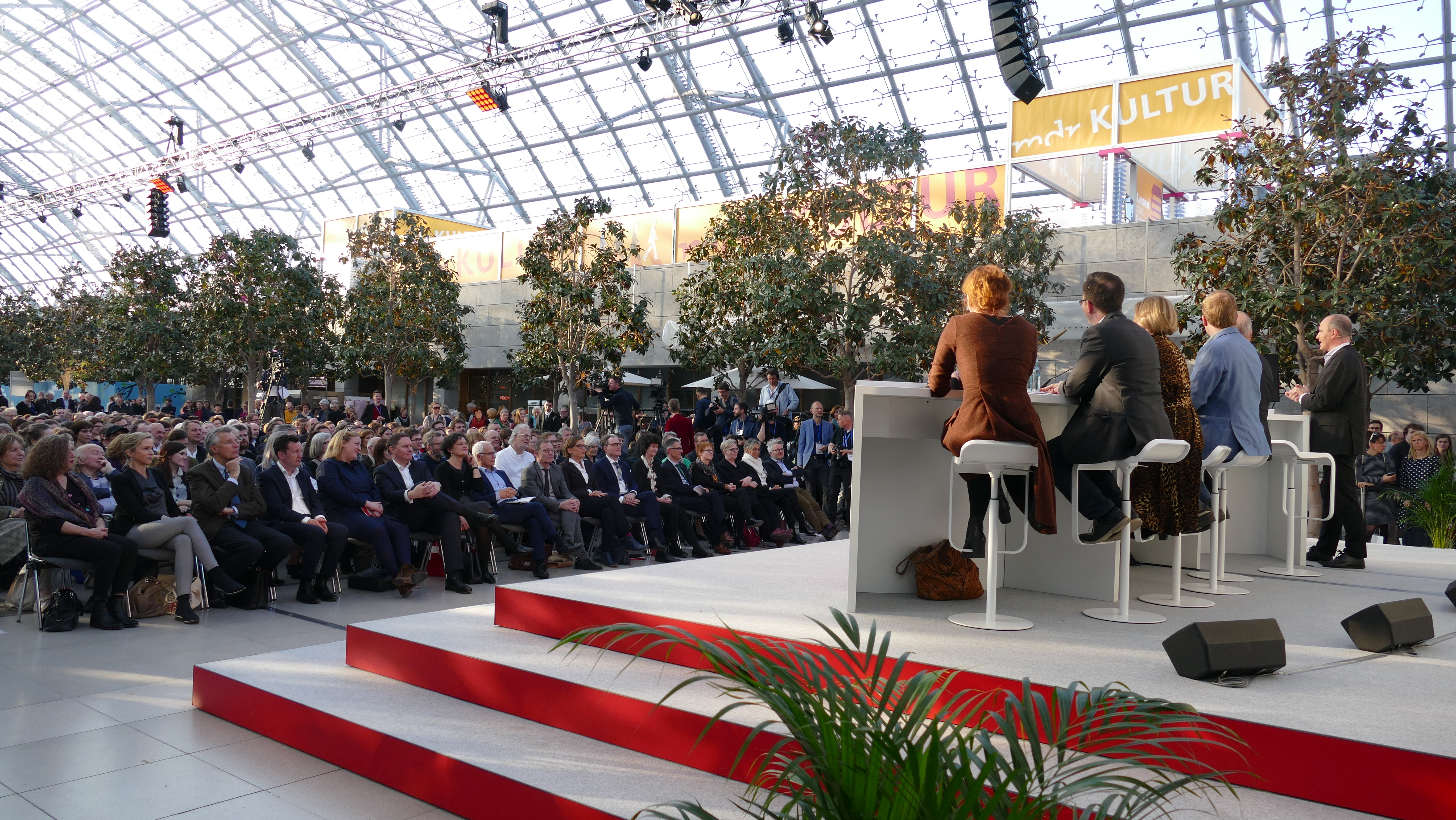 Preis der Leipziger Buchmesse - In den ersten Reihen Verleger und Autoren, wie auch der Vorsteher des Börsenvereins, der Direktor der Leipziger Messe wie auch der Politik.